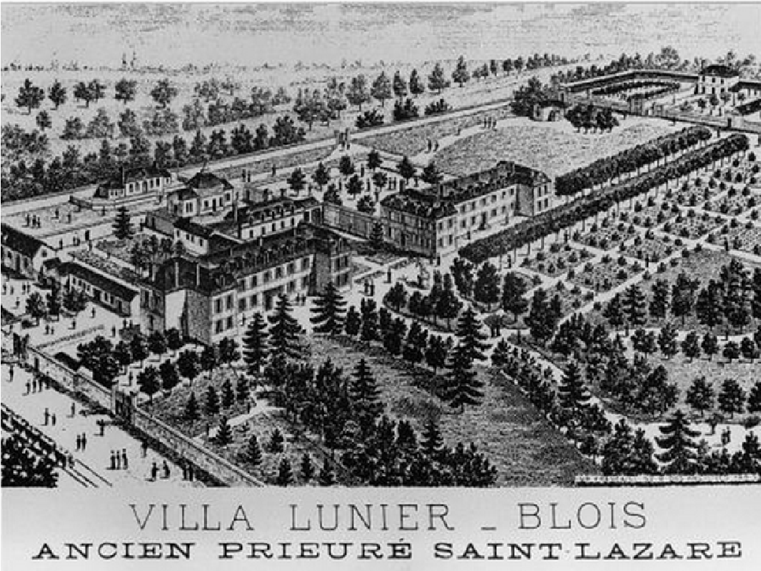 Villa Lunier - ancien prieuré Saint-Lazare (Blois). Gravure de L. Doutrebente, v. 1890. On voit, à droite, l'actuel bâtiment Lunier et, à gauche, l'actuel bâtiment Hugo de la cité scolaire Augustin-Thierry. Le bâtiment central (qui relie les deux autres) a aujourd'hui disparu.